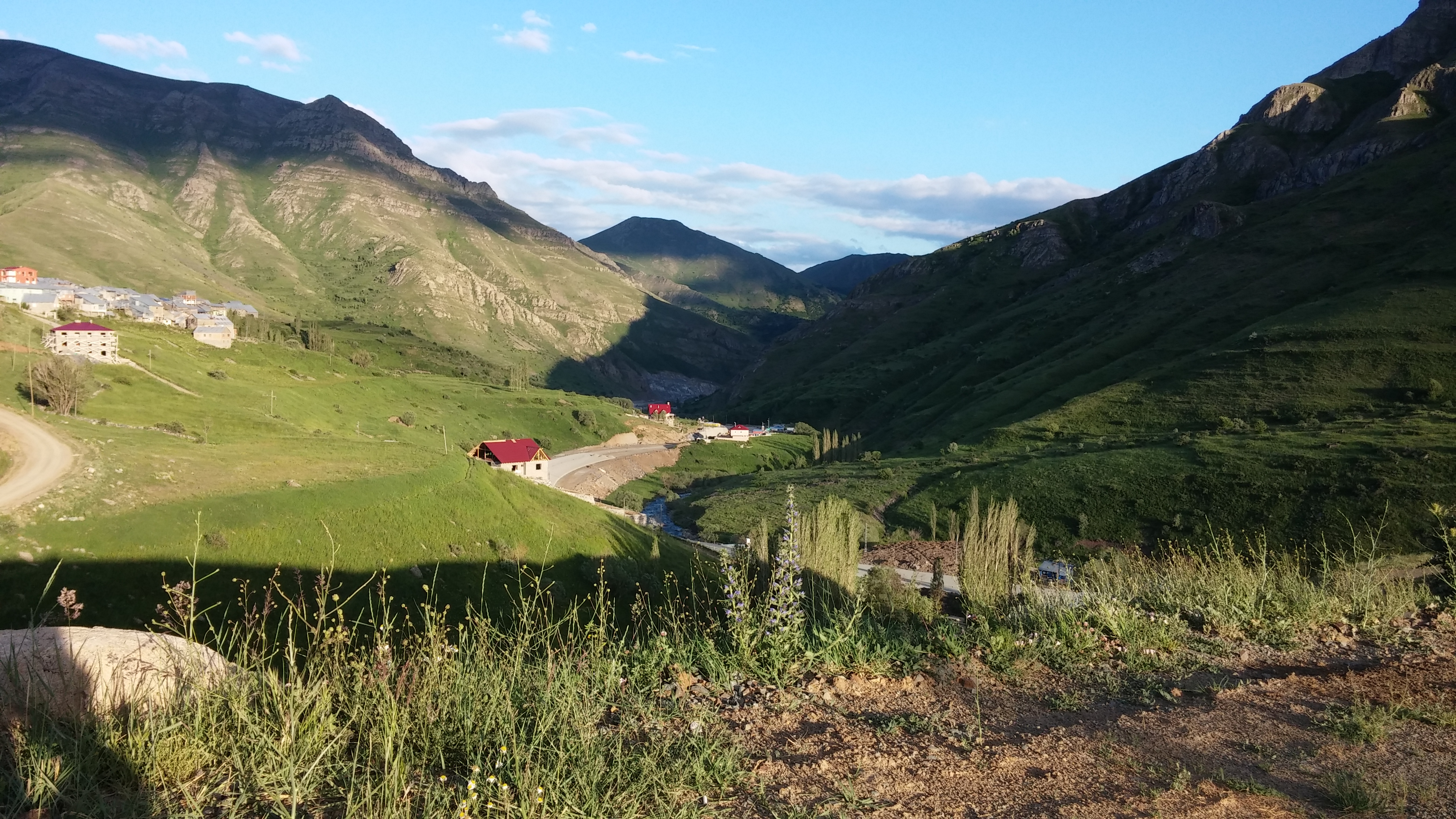 ovit yaylası